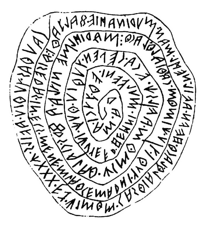 "Piombo di Magliano - Iscrizione A"